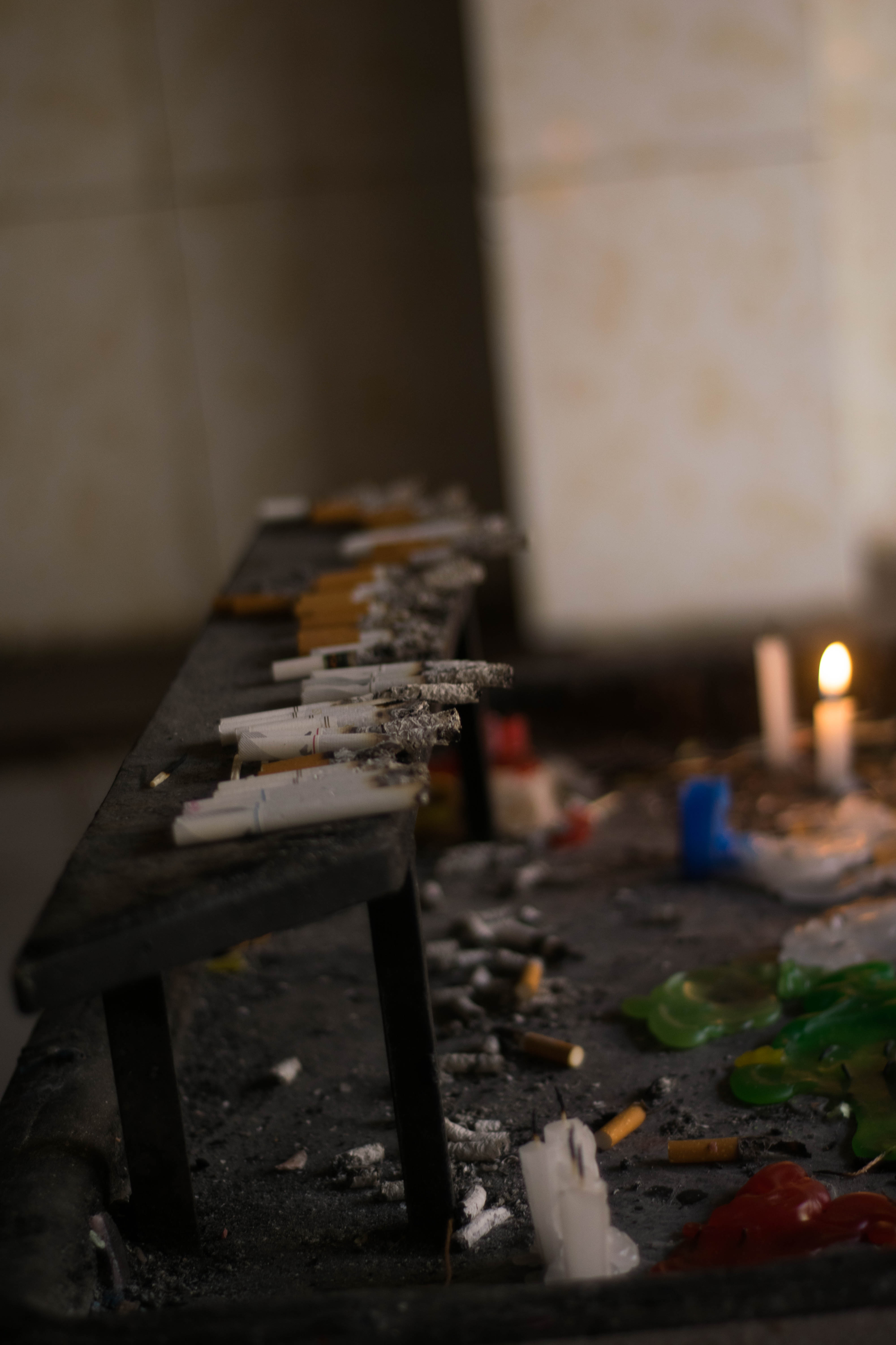 Cementerio General de Potosí This medium shows the protected monument with the number P/F0-001 in Bolivia.